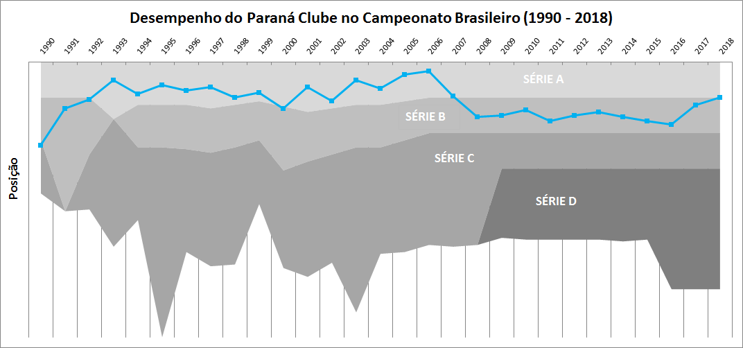 Gráfico mostrando a posição do Paraná Clube em suas participações em diferentes divisões do Campeonato Brasileiro de Futebol Masculino entre os anos de 1990 e 2018. Dados retirados do site